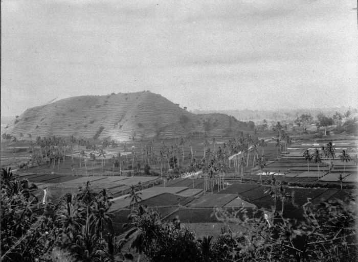 Foto. Bali, rijstvelden in vulkaanlandschap bij Boegboeg.